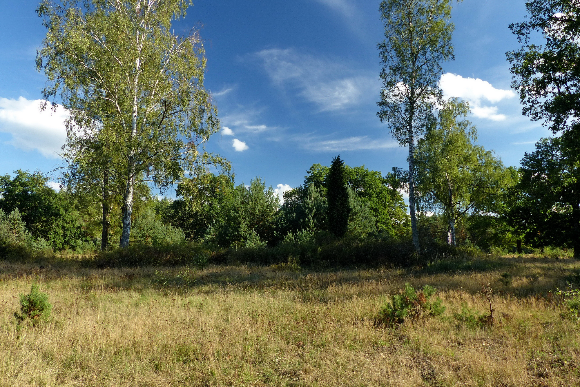 Místo loveckého zámečku v bývalém Strážově